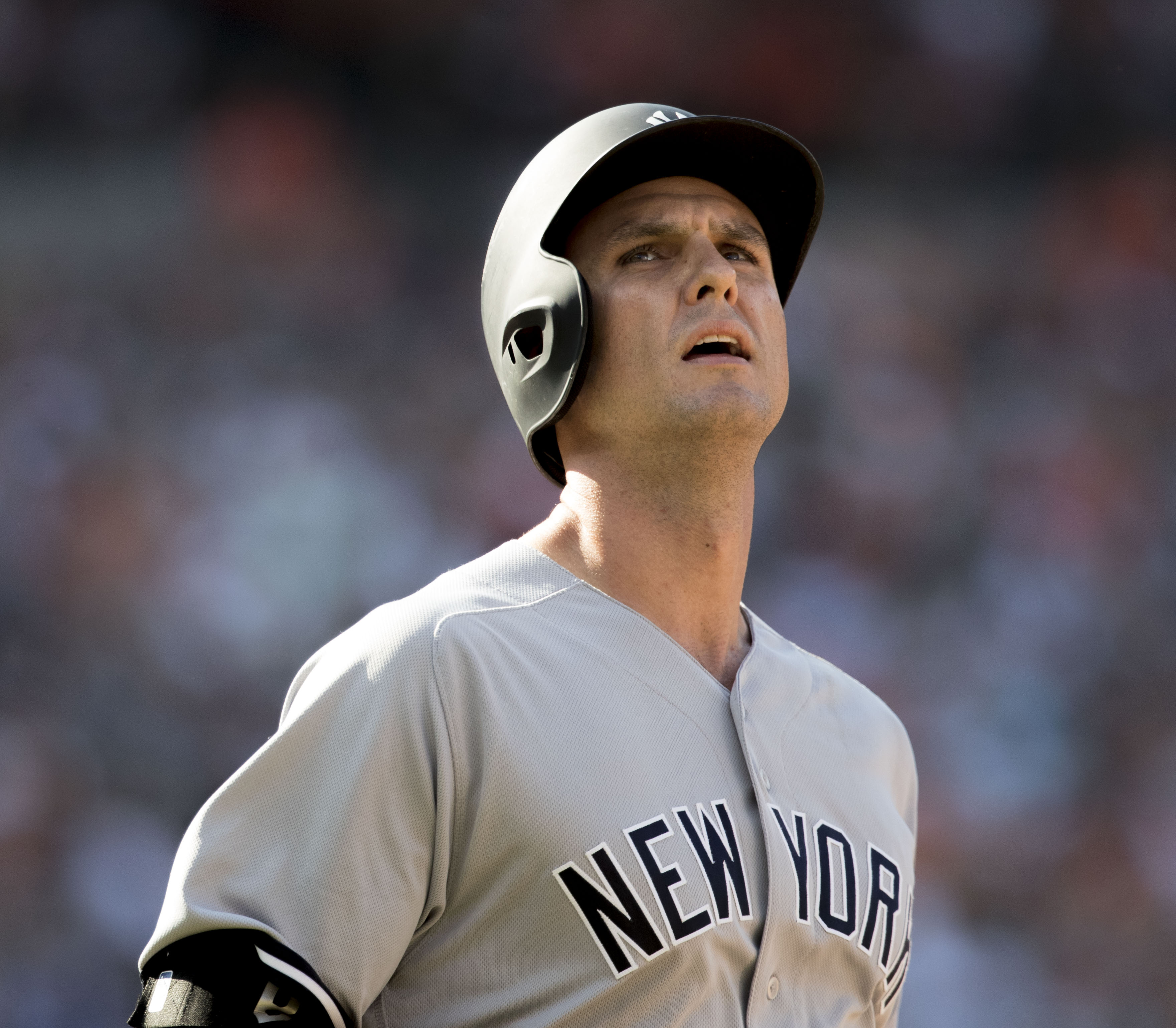 Yankees at Orioles 9/4/17